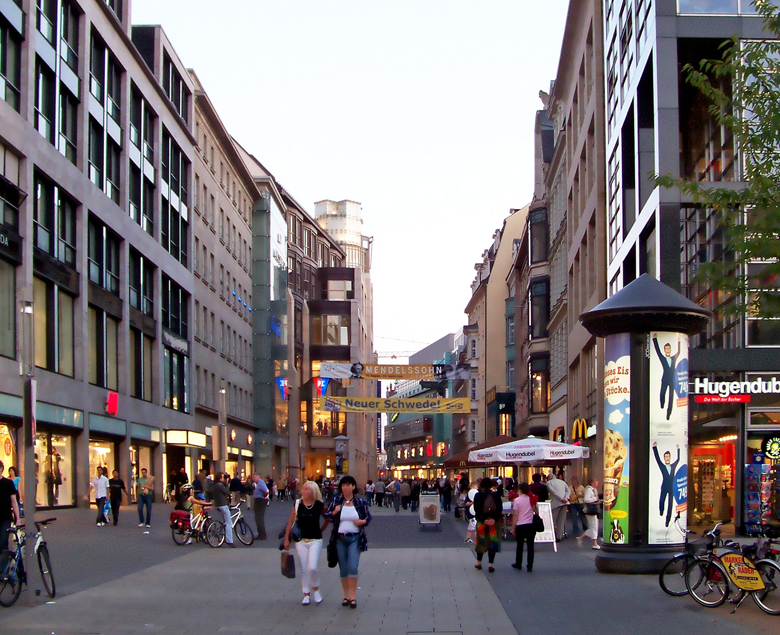 Petersstraße in Leipzig, Blick in Richtung Wilhelm-Leuschner-Platz